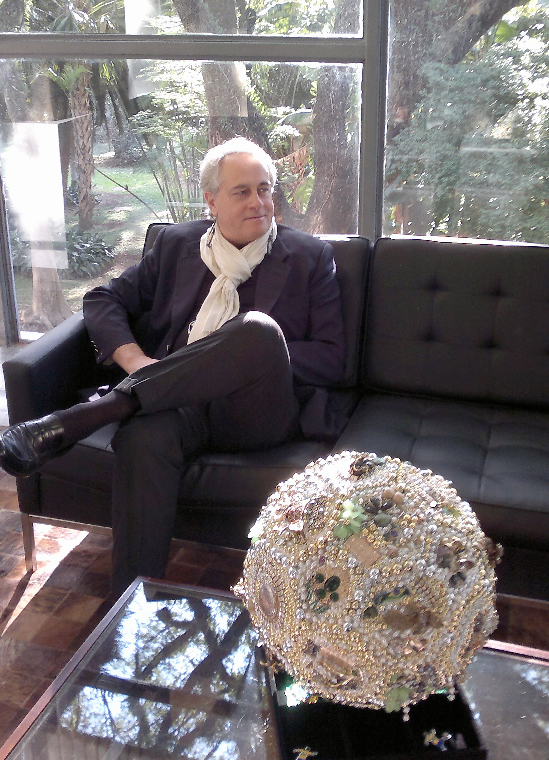 Joseph Pace no momento da entrega de sua obra ao Museu Afro Brasil para a exposição do Futebol 2014